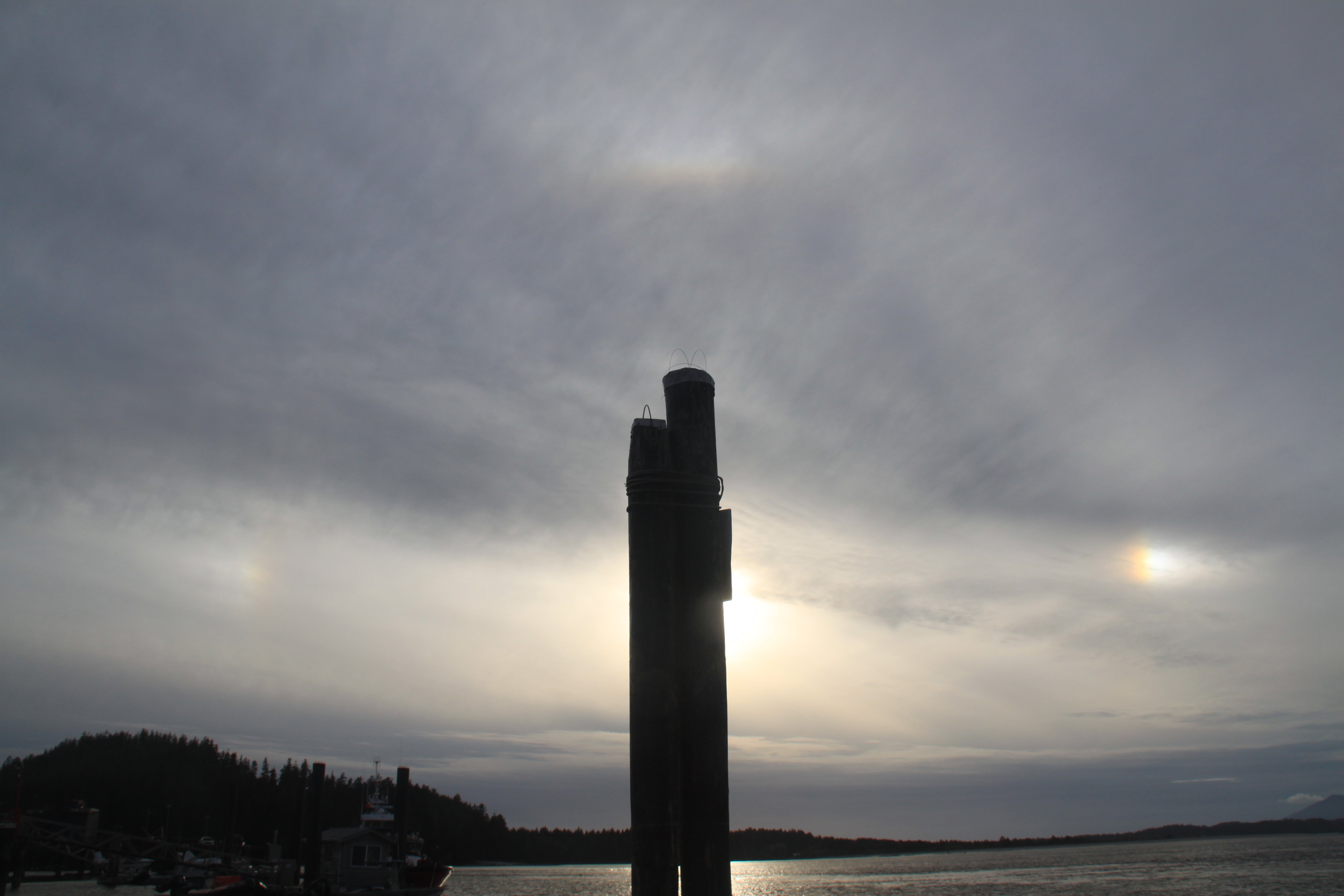 Es sind links, rechts und über der Hauptsonne Nebensonnen zu erkennen. Es wurde auf einem Bootssteg im Hafen von Tofino gegen 19:15 gemacht.